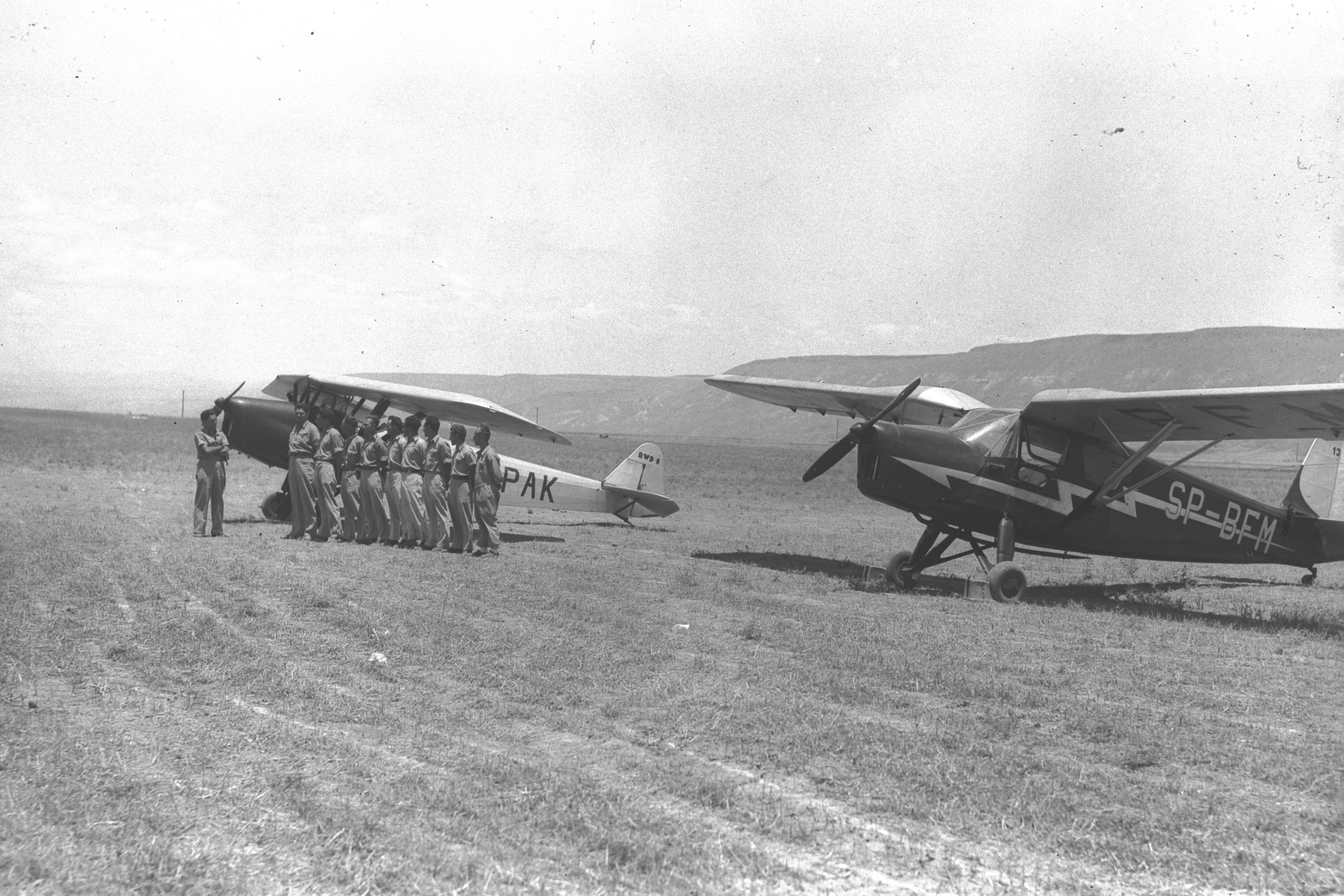 A group of Hagana pilot trainees, with their instructor, in the Jordan Valley near Kibbutz Afikim. חניכי קורס טייס של ההגנה, מקשיבים למדריכם בבקעת הירדן, ליד קיבוץ אפיקים.